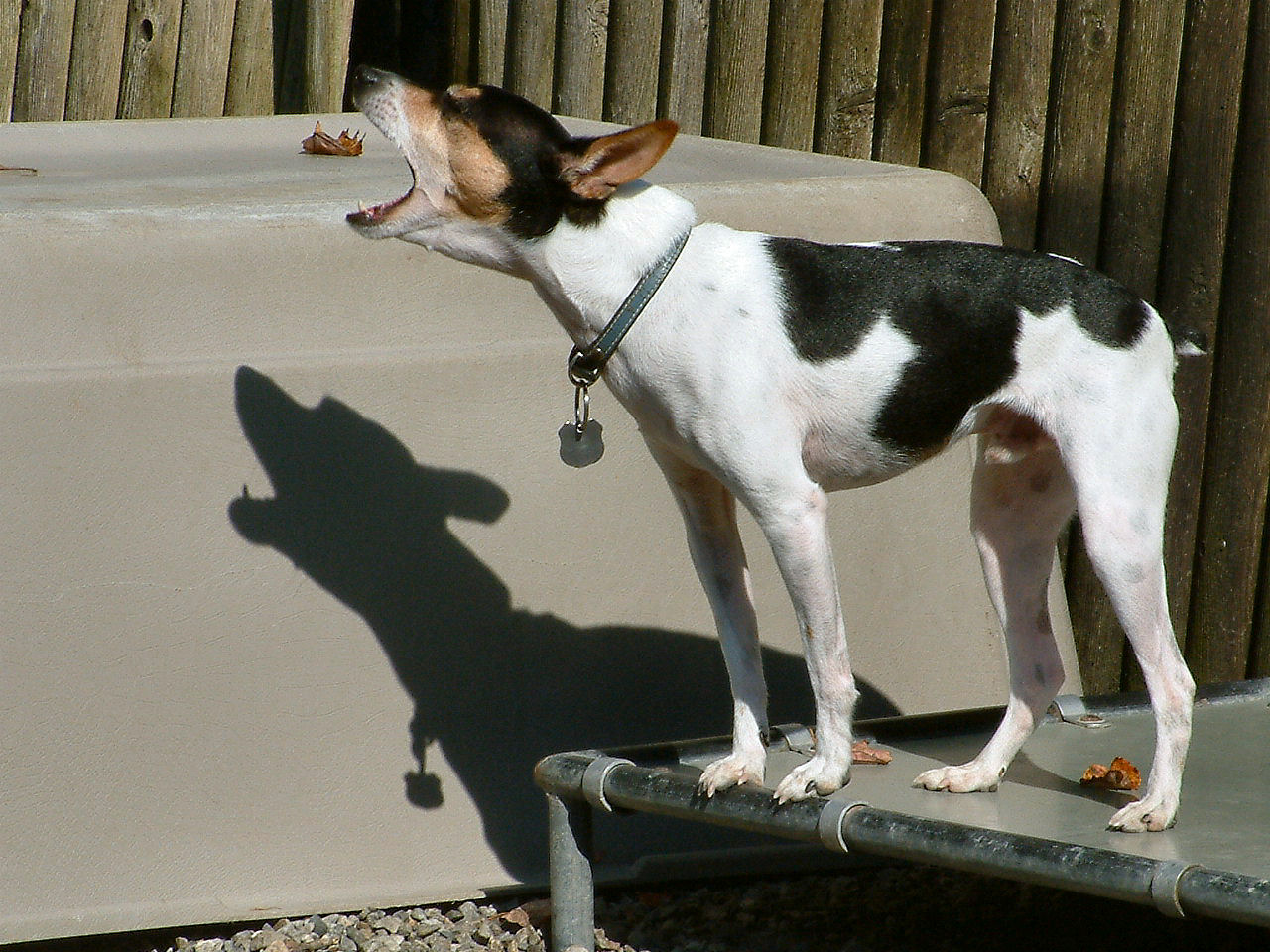 A male Rat Terrier barking.